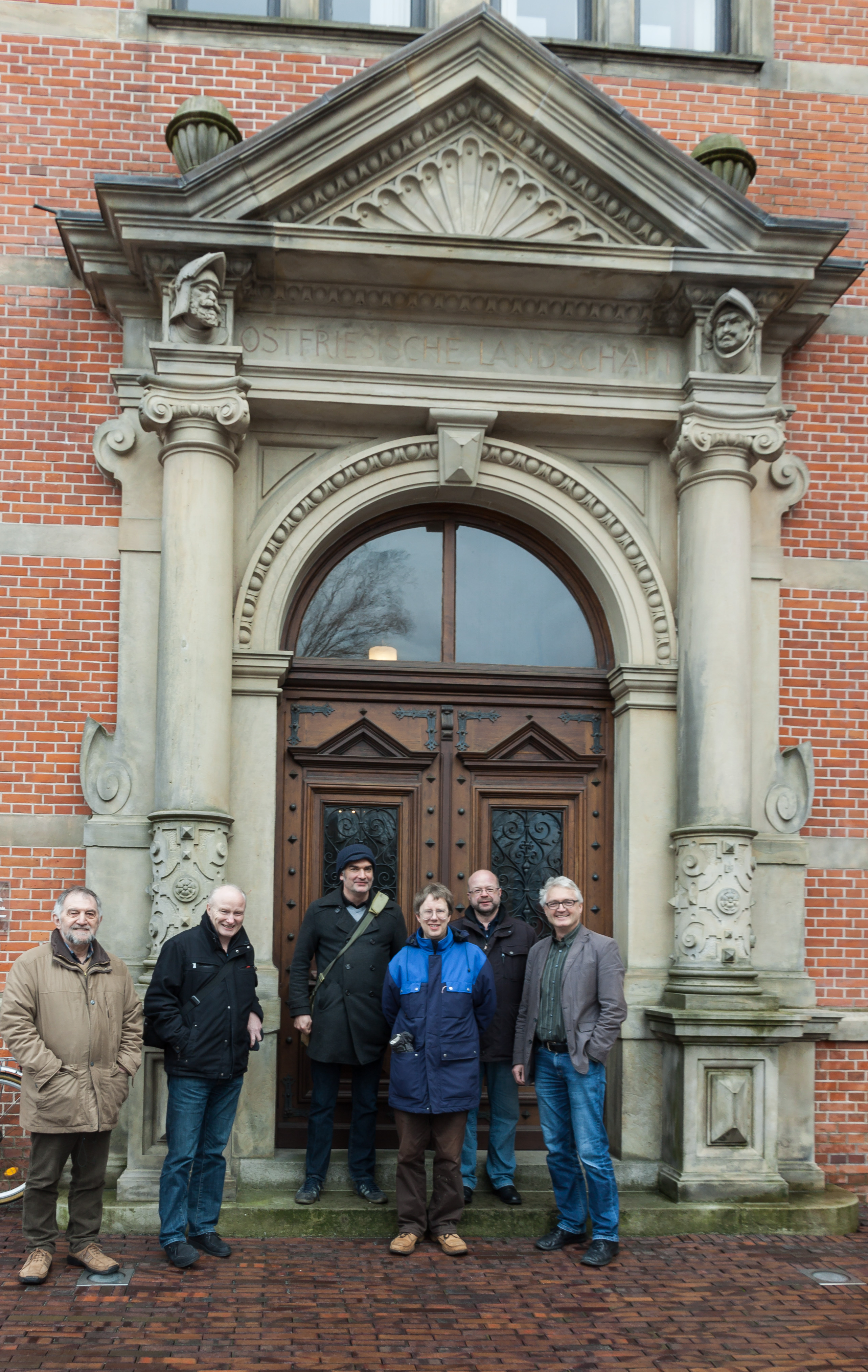 Der Wikistammtisch Ostfriesland zu Gast in der Ostfriesischen Landschaft (Februar 2015)